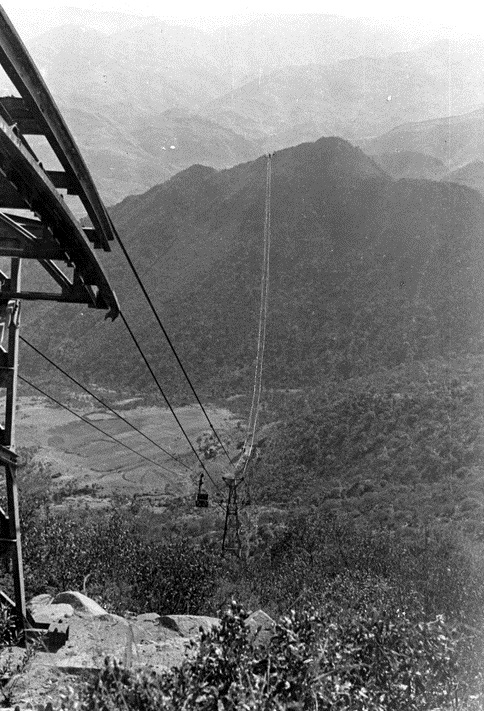 Da tappa vecchia verso Golei